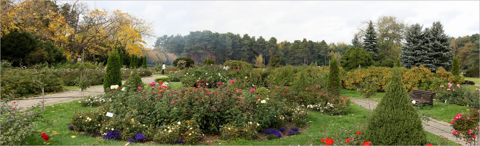 ЦБС. Ружоўнік